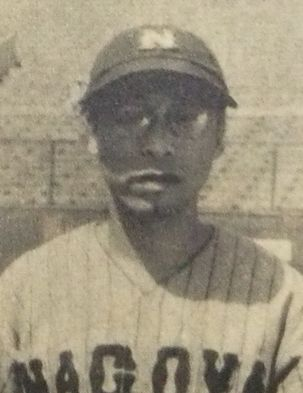 星田次郎